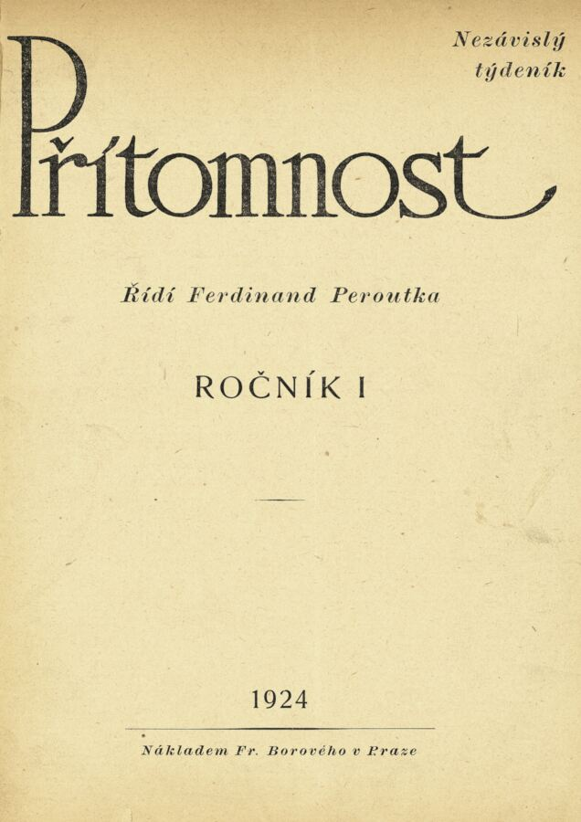 Titulní strana časopisu Přítomnost z roku 1924